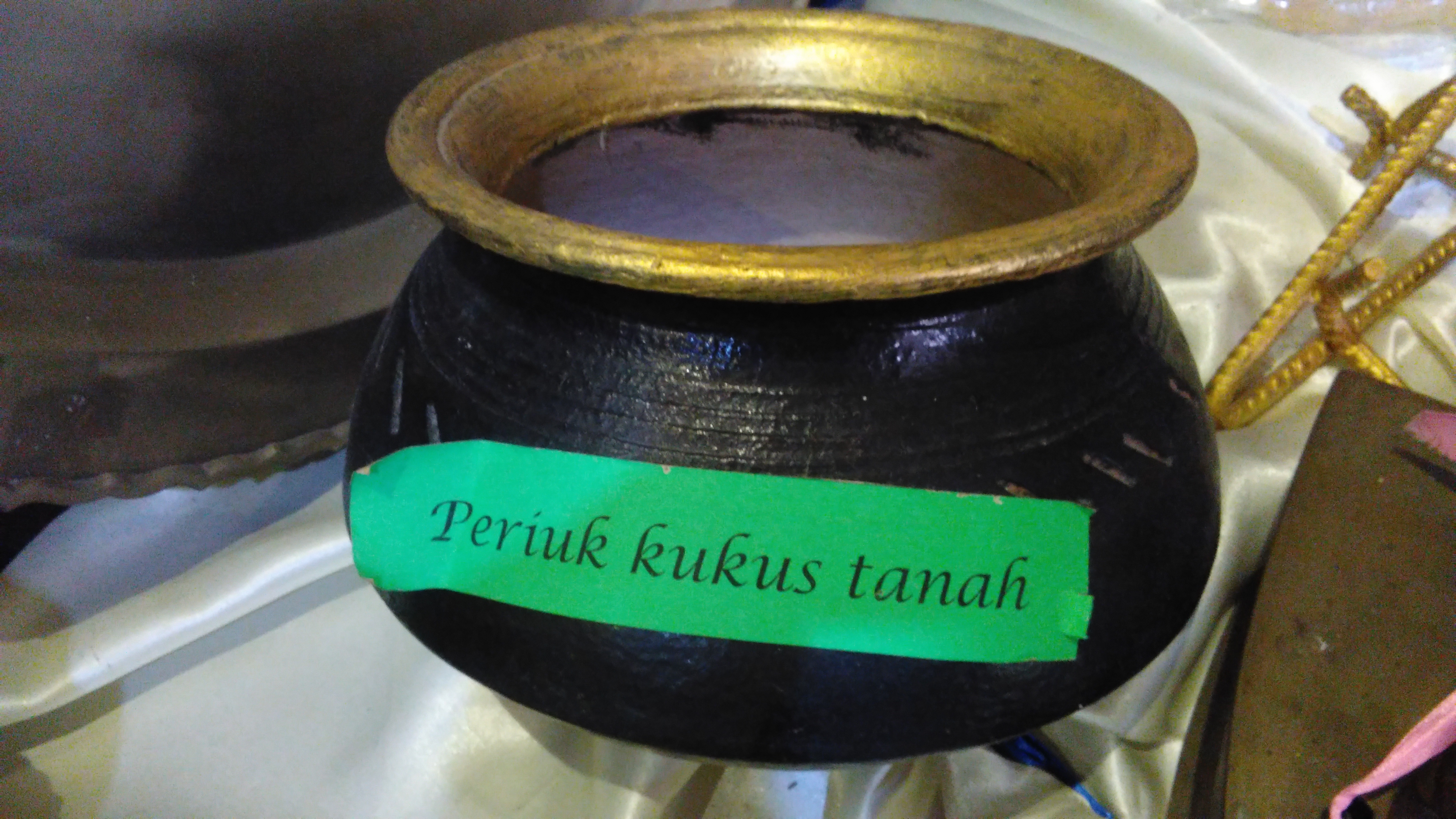 Periuk Kukus Tanah